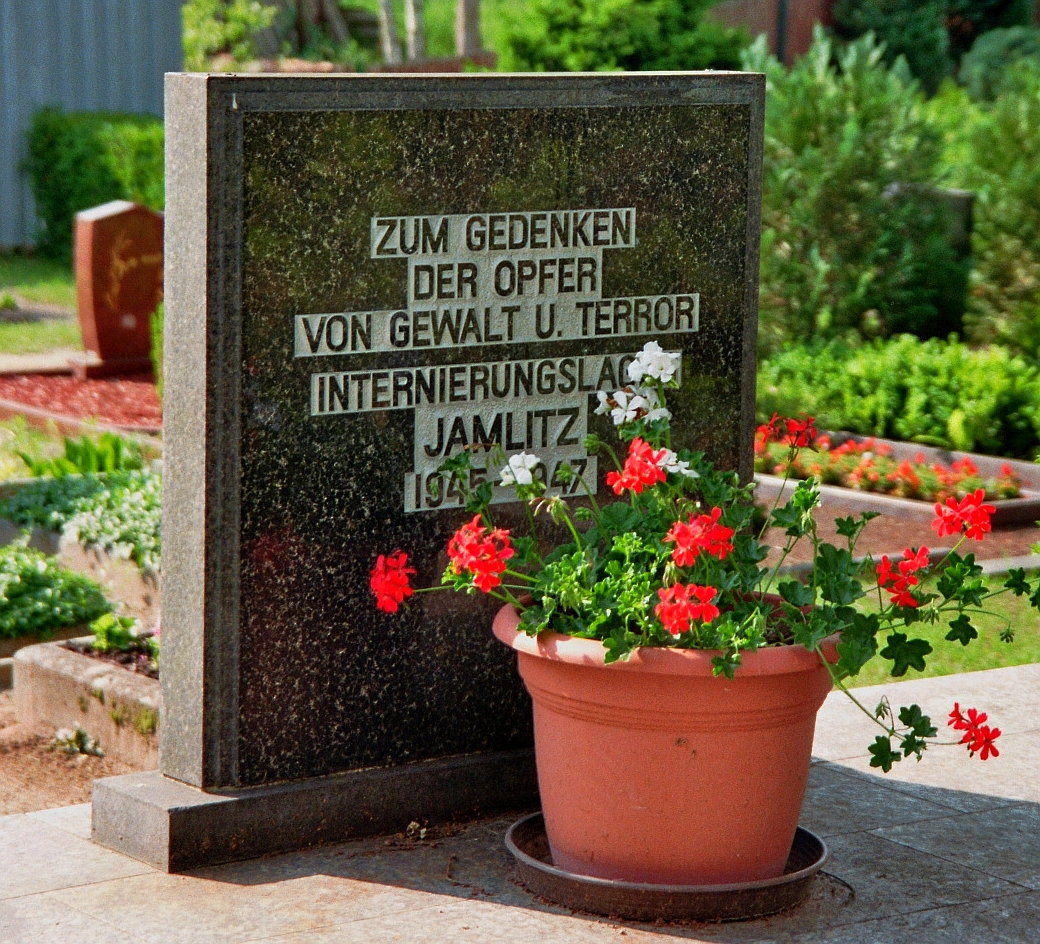 Gedenkstein für die Opfer des Internierungslagers Jamlitz 1945-1947 auf dem Friedhof Jamlitz, Amt Lieberose/Oberspreewald, im Landkreis Dahme-Spreewald, Brandenburg, Deutschland.